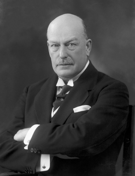 Milsom Rees